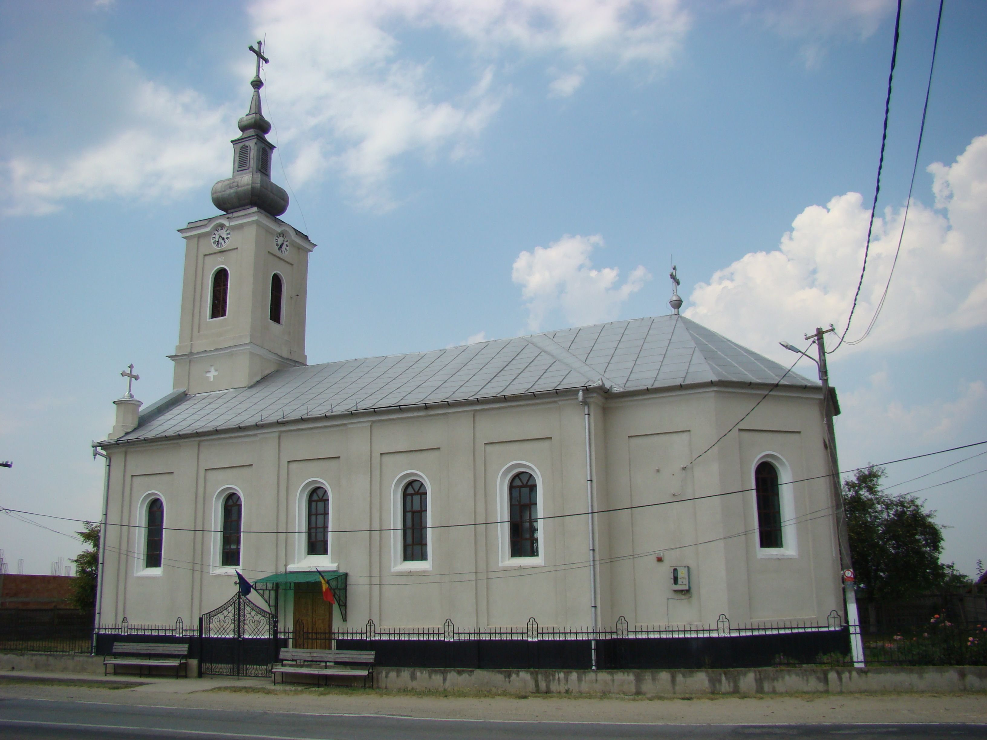 Biserica ortodoxă din Traian Vuia, Timiș